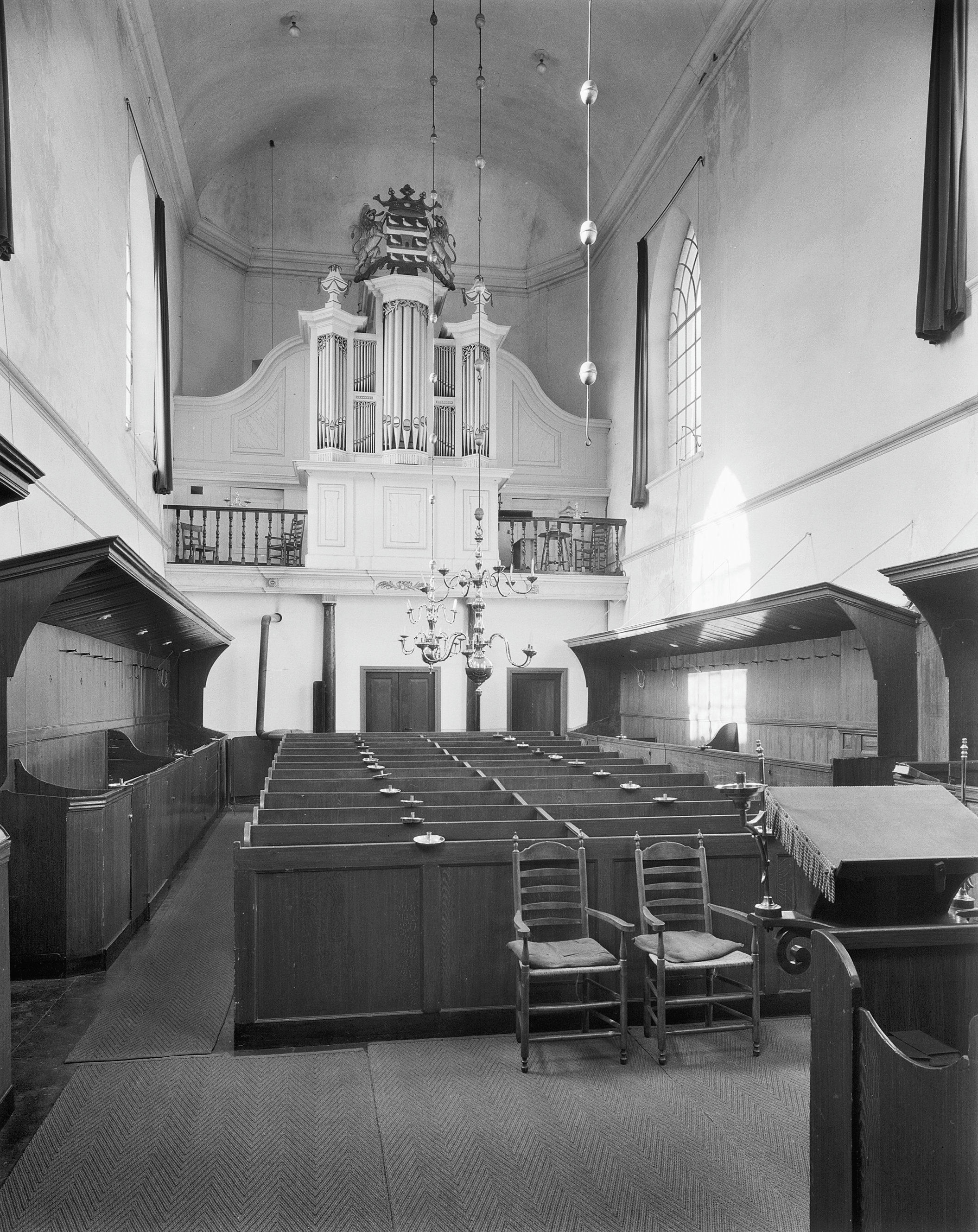 Nederlands Hervormde Kerk: interieur naar het westen